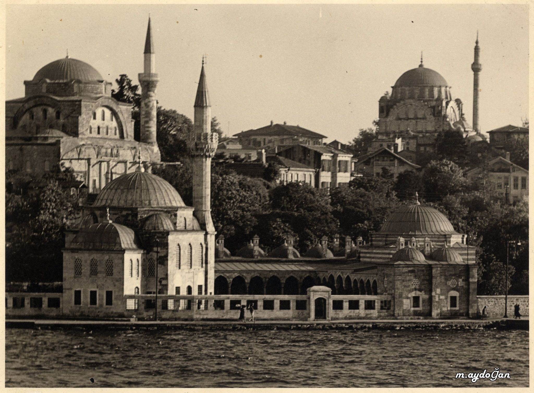 مسجد شمسي باشا في اسكودار اسطنبول